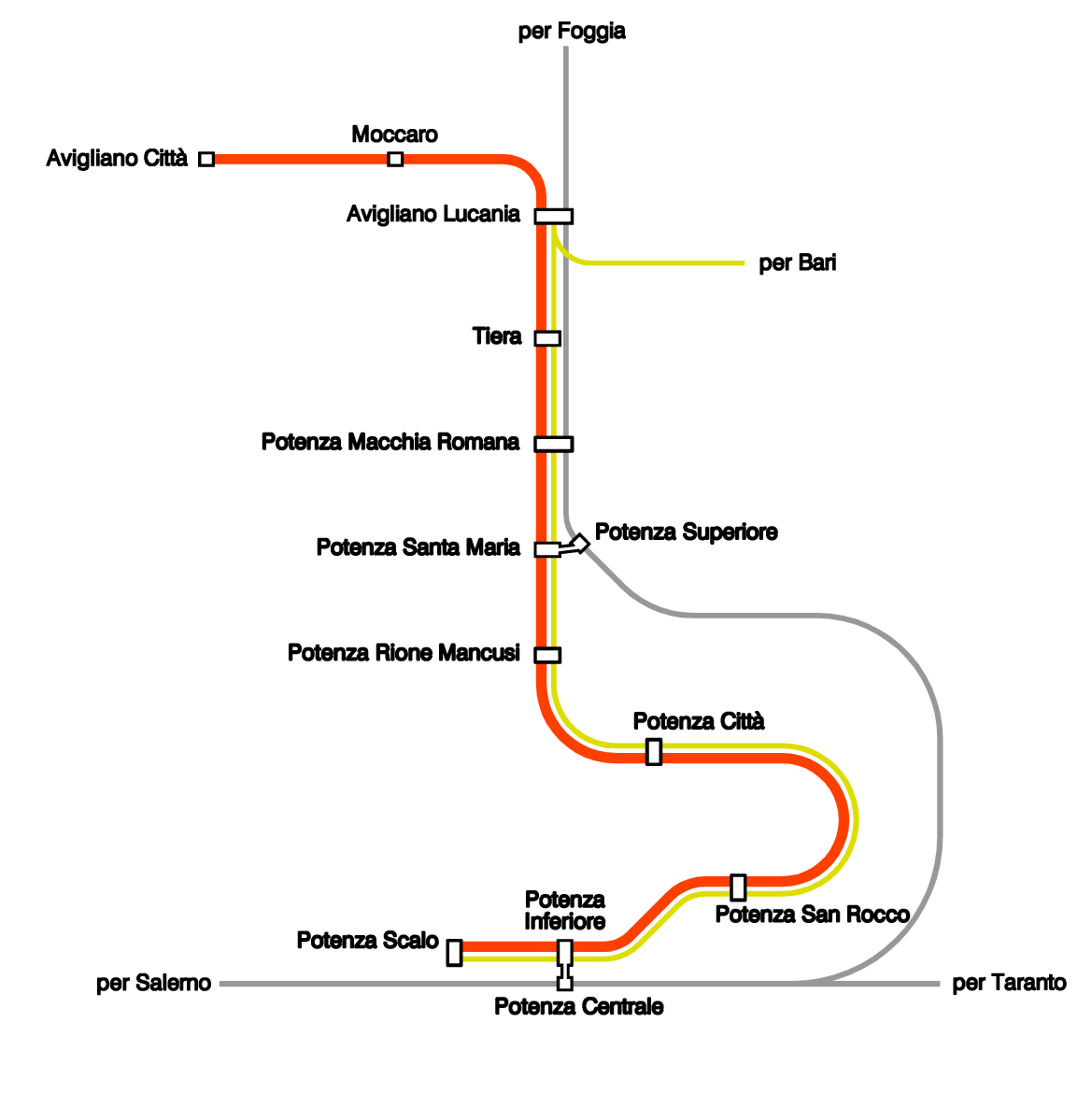 Percorso del servizio ferroviario metropolitano di Potenza.